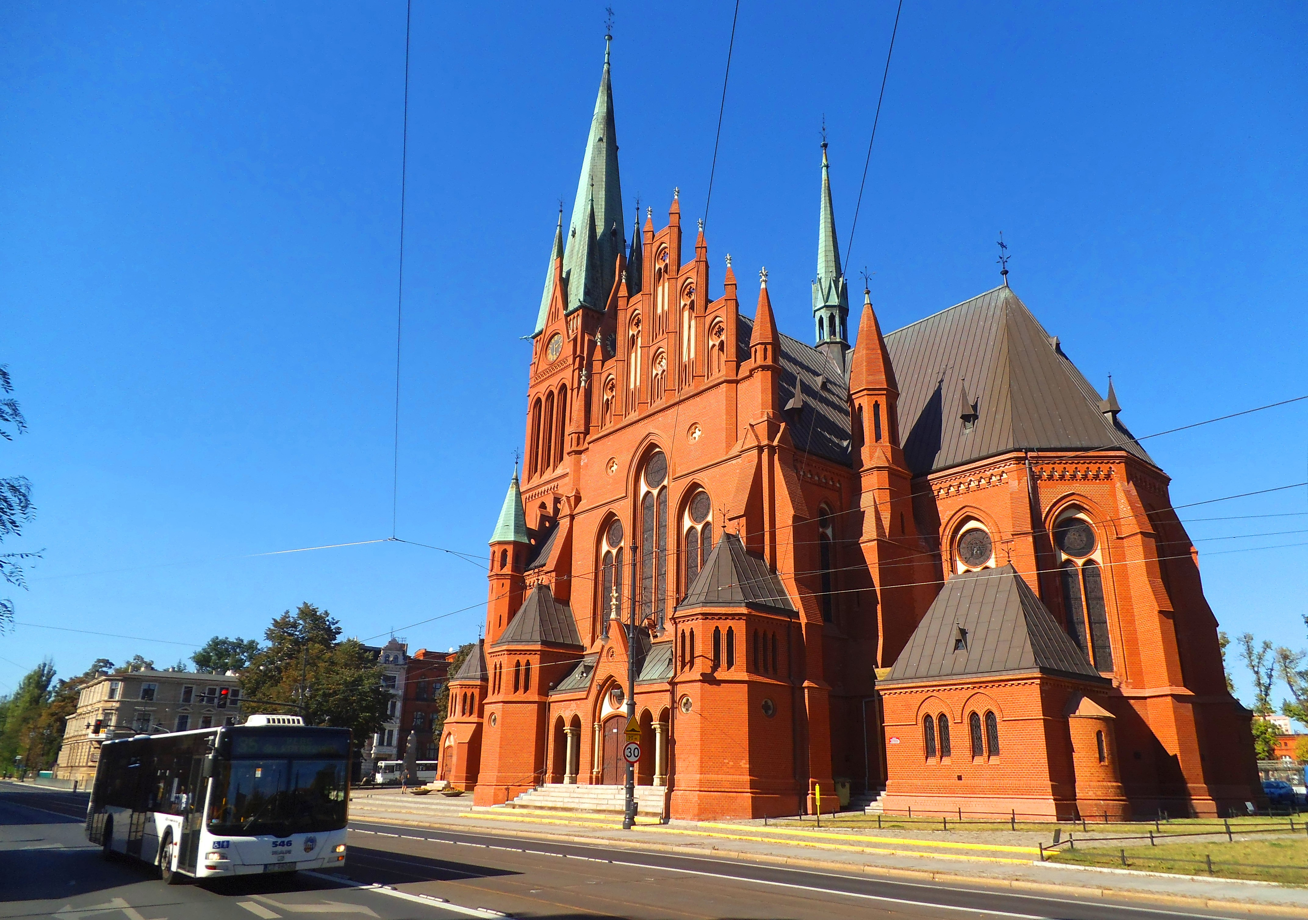 Kościół Garnizonowy św. Katarzyny w Toruniu